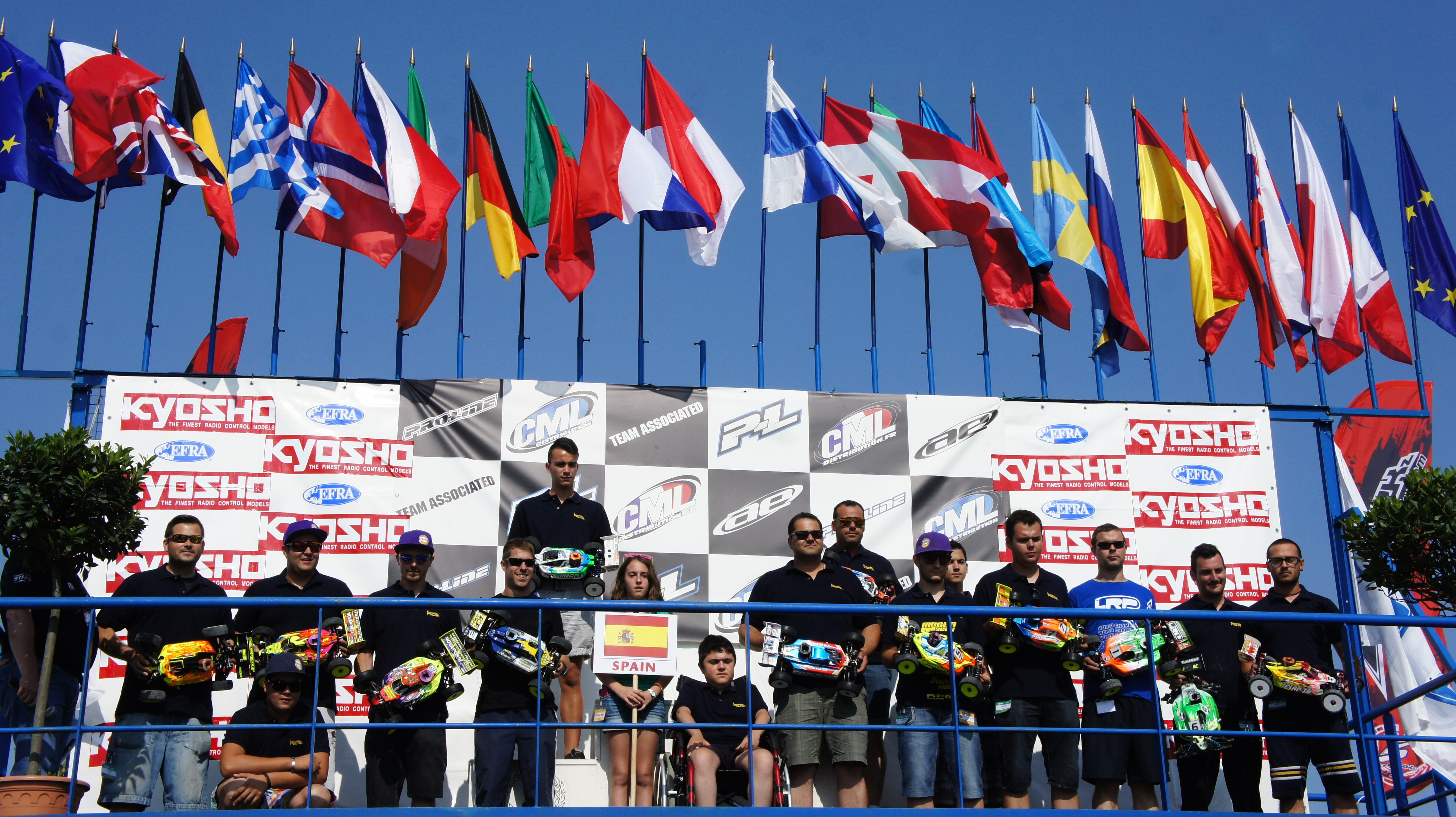 Lors du championnat d'Europe EFRA 2013 à Reims.